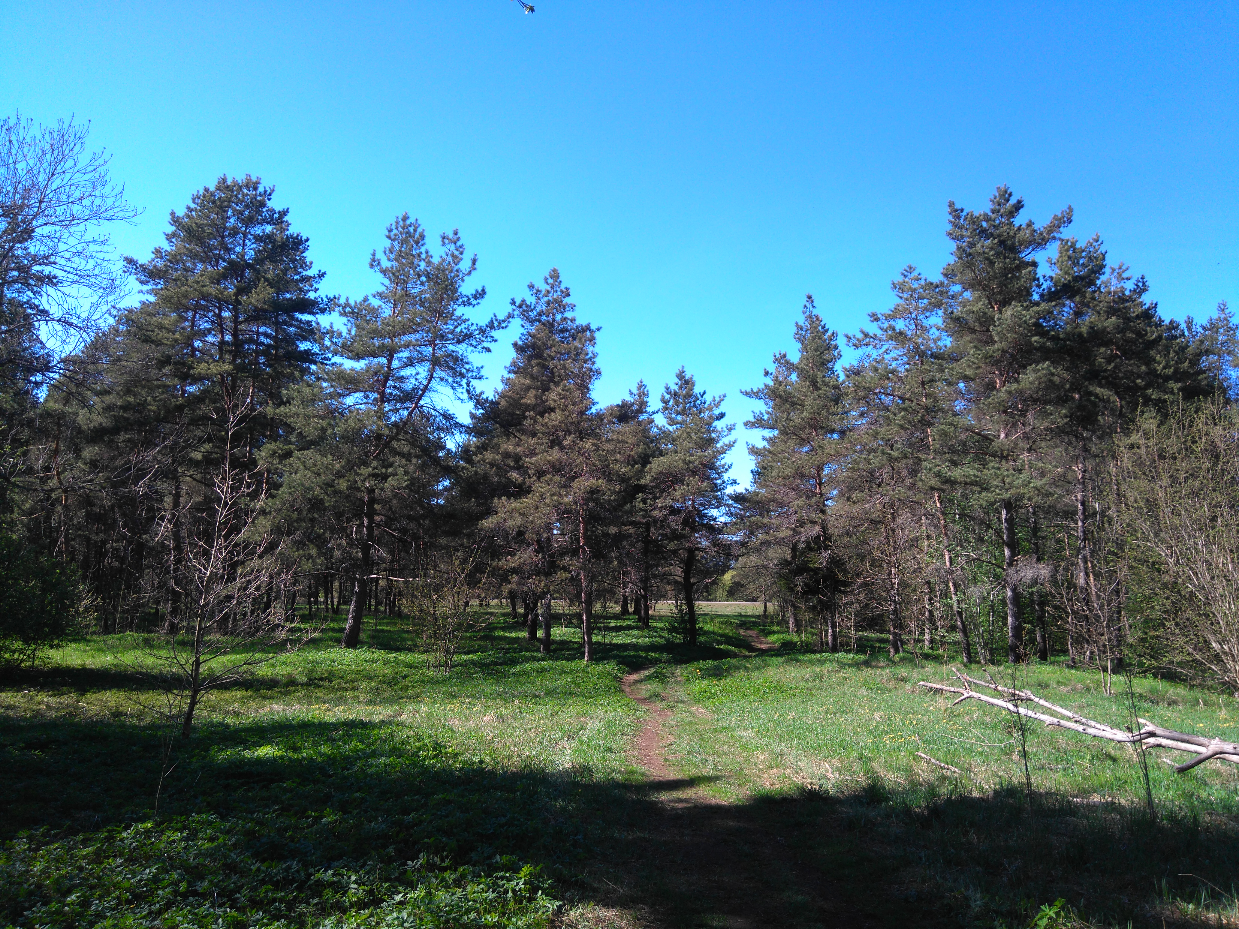 Kuusiku parkmets Tallinnas.